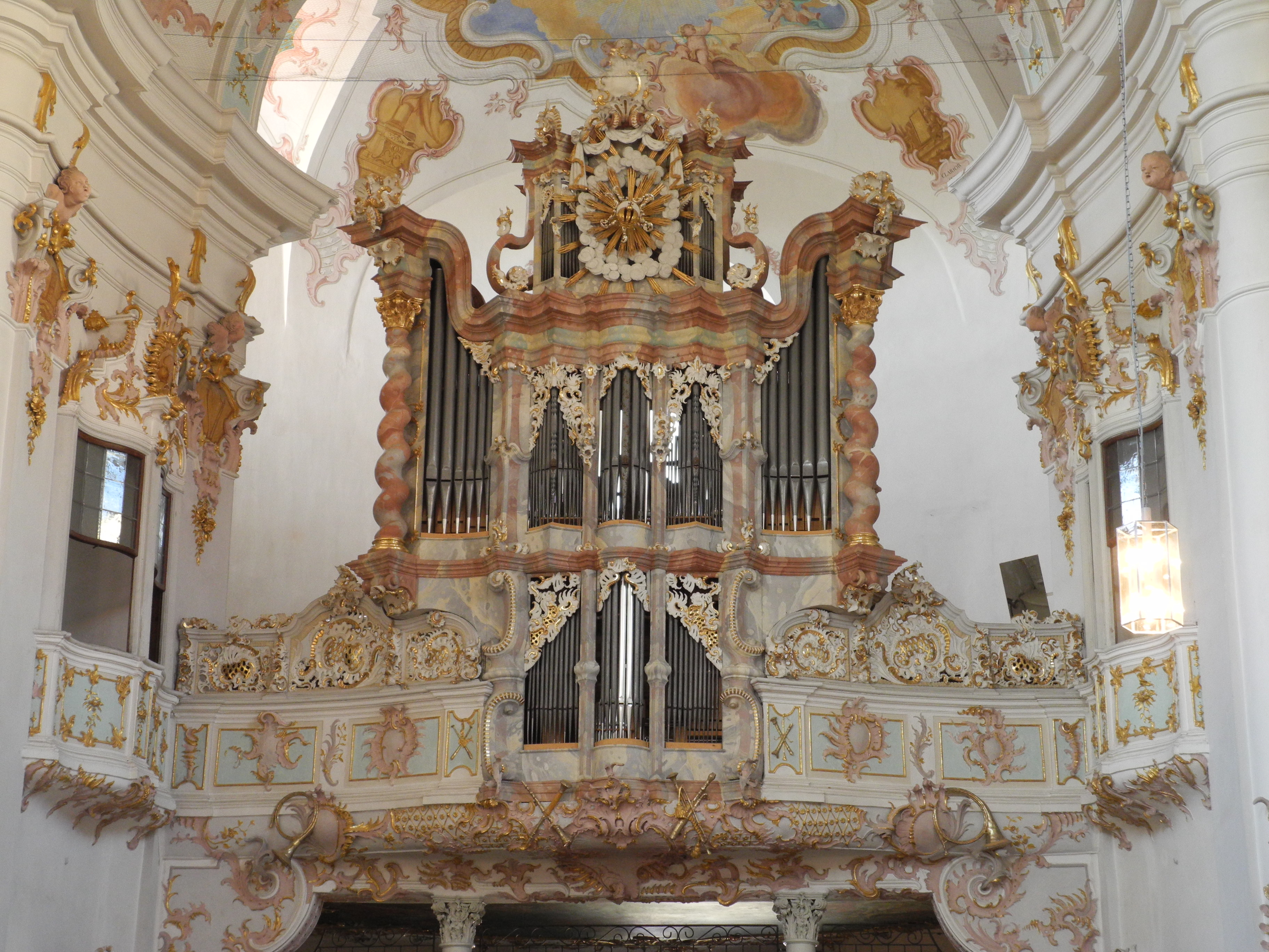 Orgelgehäuse von Brandenstein (1752), darin Werk von Ziegltrum 2003